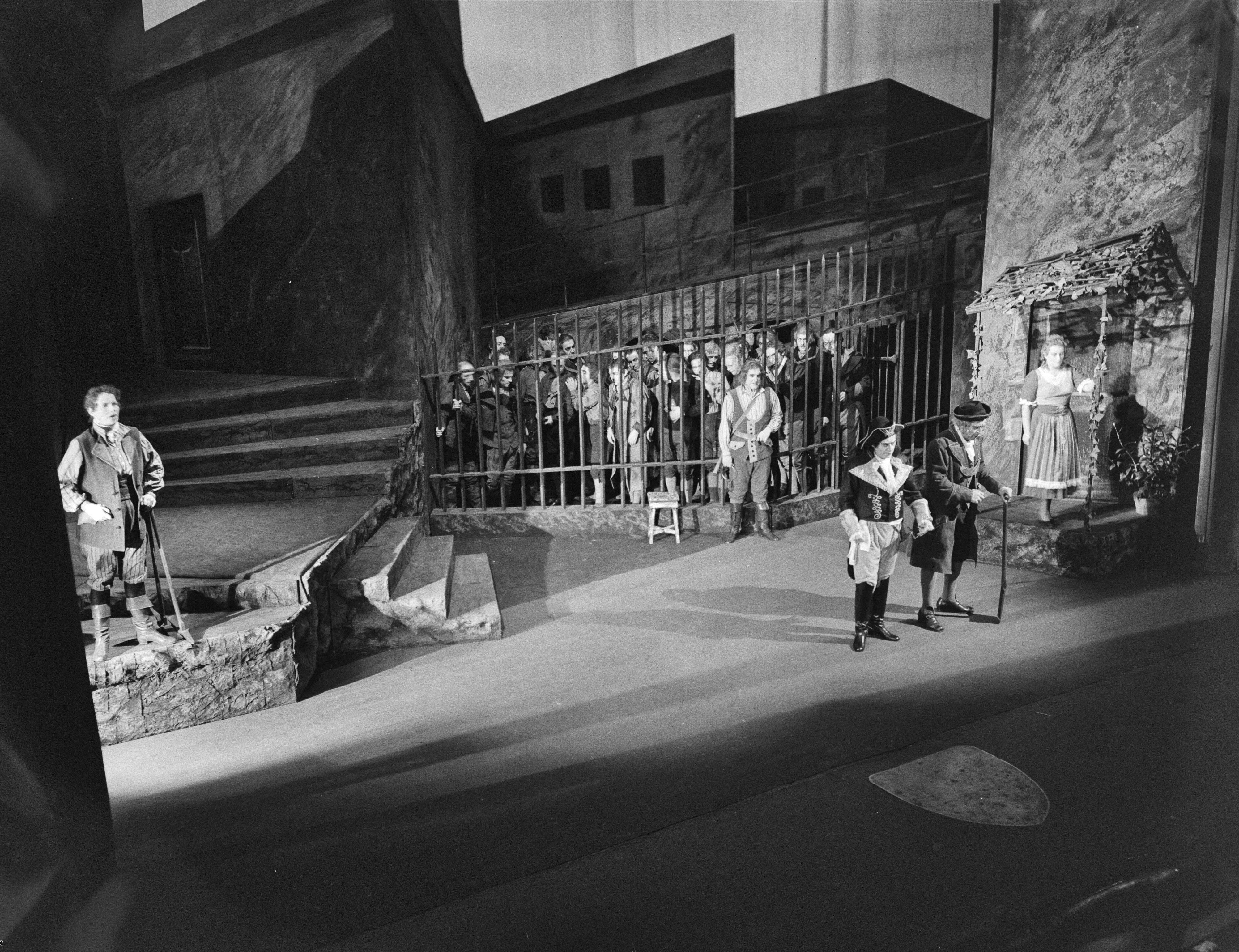 Collectie / Archief : Fotocollectie Anefo Reportage / Serie : [ onbekend ] Beschrijving : Premiere Fidelio Nederlandse Opera Datum : 14 november 1949 Trefwoorden : OPERAPREMIERES Fotograaf : Vermorken, […] / Anefo Auteursrechthebbende : Nationaal Archief Materiaalsoort : Negatief (zwart/wit) Nummer archiefinventaris : bekijk toegang 2.24.01.04 Bestanddeelnummer : 903-7095